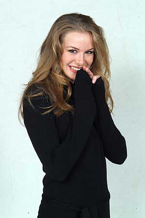 La actriz española Mercè Llorens